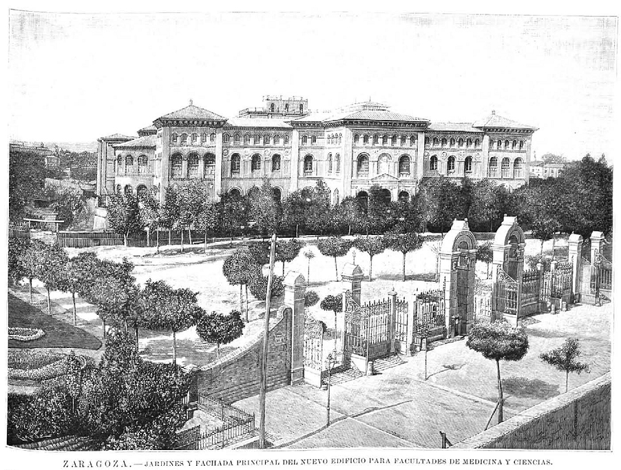 Zaragoza, jardines y fachada principal del nuevo edificio para facultades de Medicina y Ciencias, en la revista española La Ilustración Española y Americana.